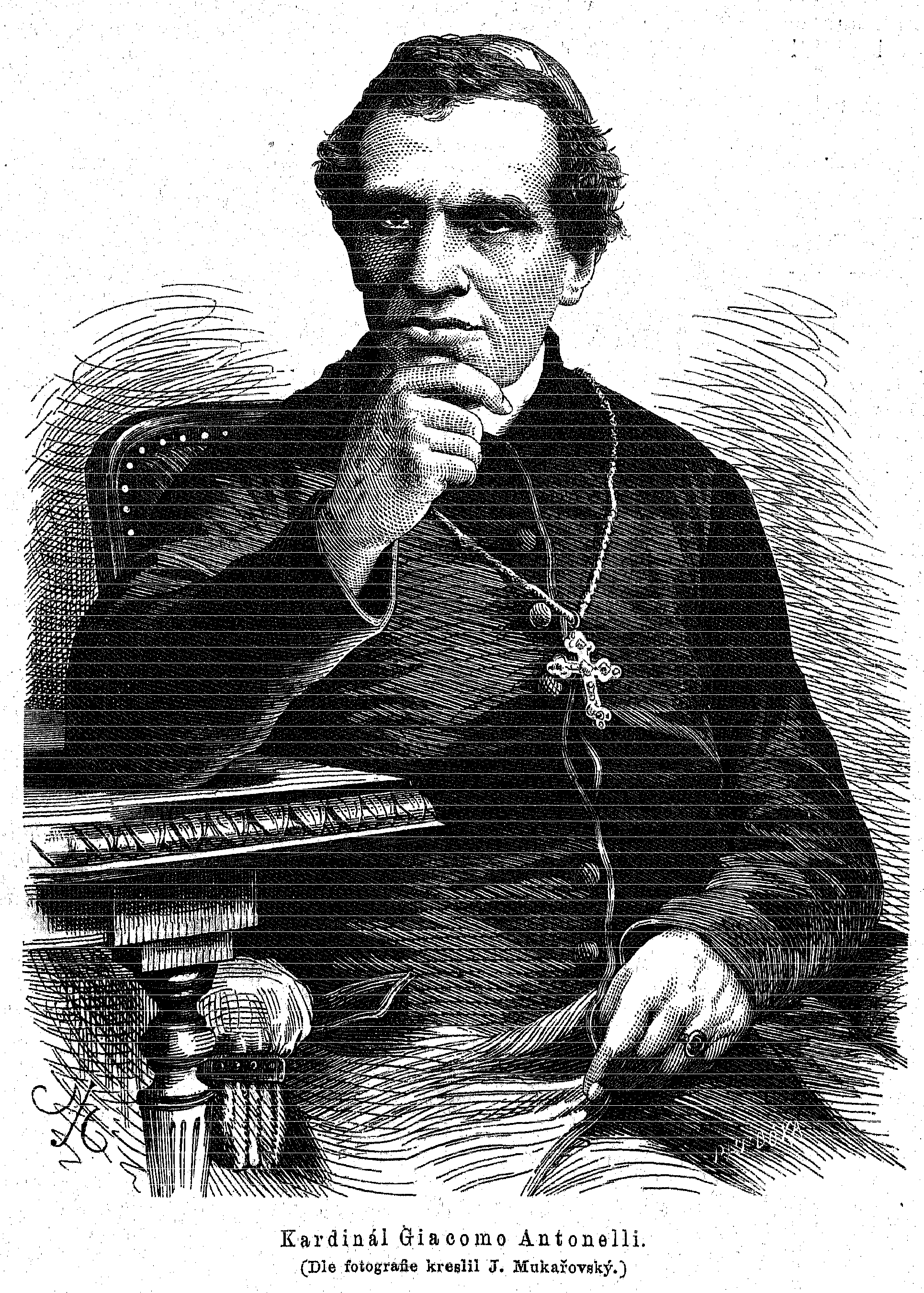 Portrait of Cardinal Giacomo Antonelli (1806 - 1876)